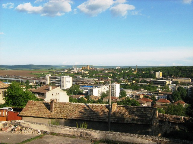 Източната заводска зона на град Попово - май 2008 год. Фото: Вл. Стойков